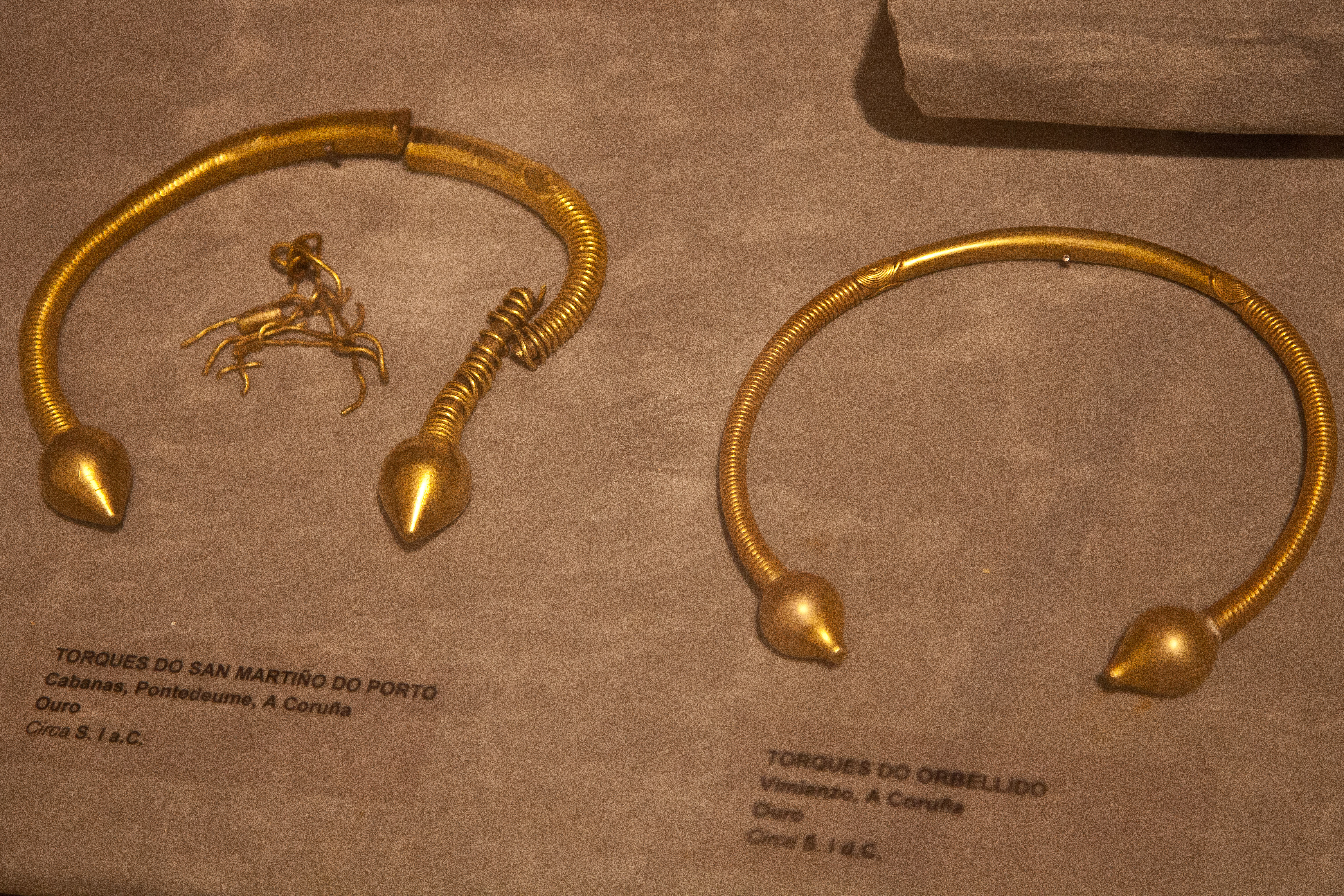 Esquerda: Torques de San Martiño do Porto, Cabanas-Pontedeume, A Coruña Ouro Circa s.I a.C. Dereita: Torques do Orbellido Vimianzo, A Coruña. Ouro. Circa s.I a.C.